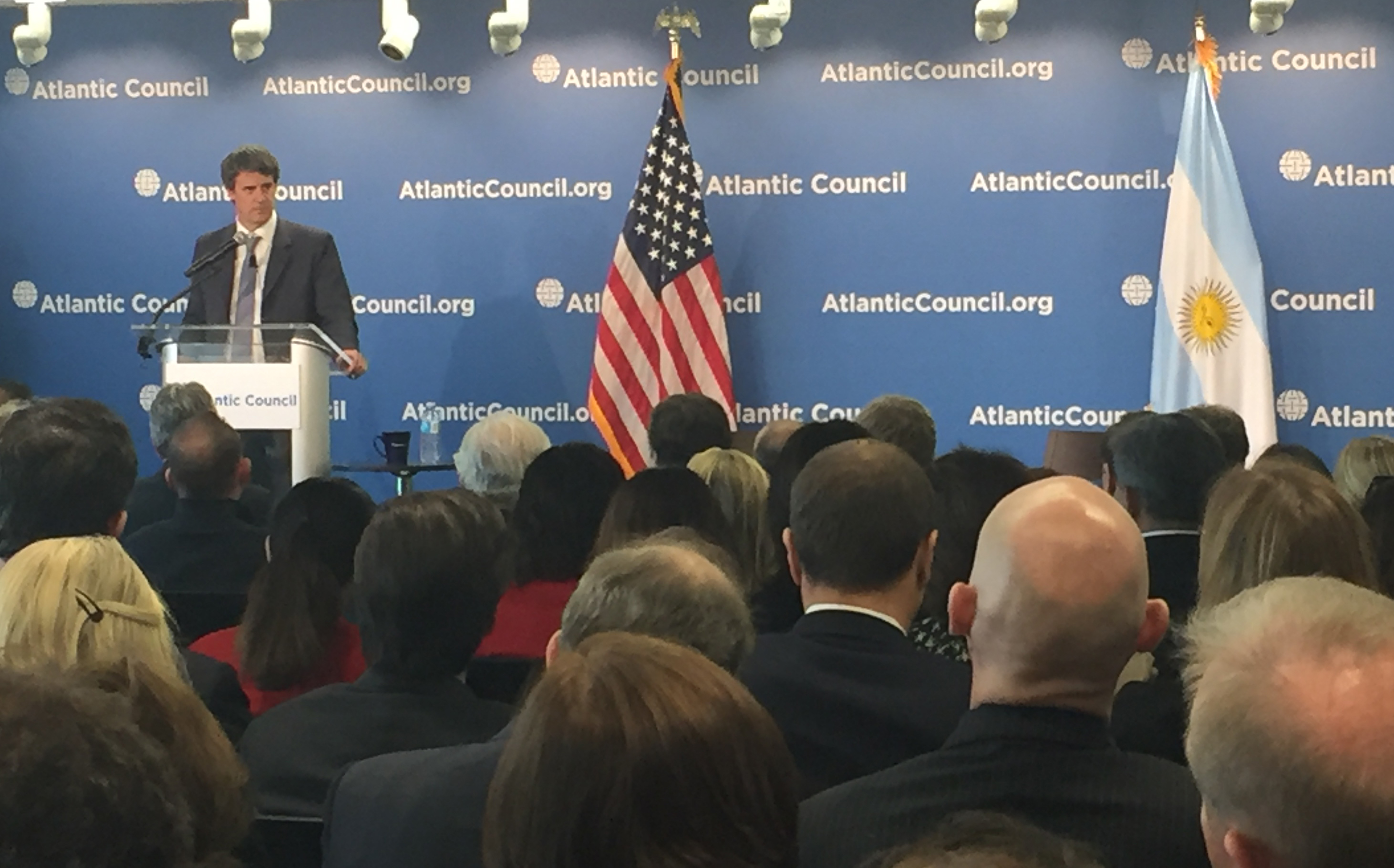 El ministro de Hacienda participa en Washington de reuniones del FMI y el Banco Mundial. Alfonso Prat Gay afirmó que la salida del default perimitirá atraer inversiones para el desarrollo de un plan de infraestructura.